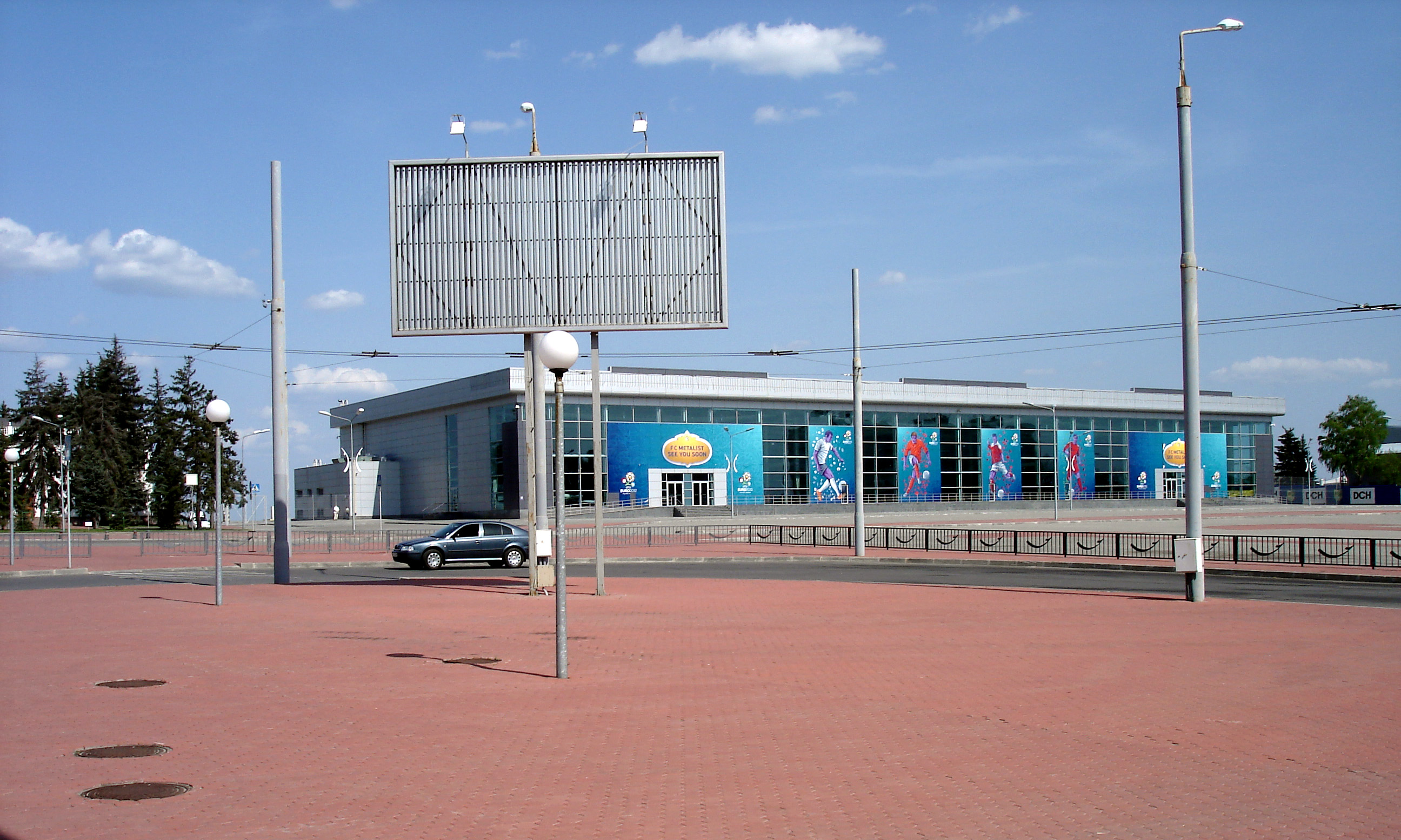 Міжнародний аеропорт «Харків». Ангар. Під час Євро-2012 – тимчасовий пасажирський термінал.